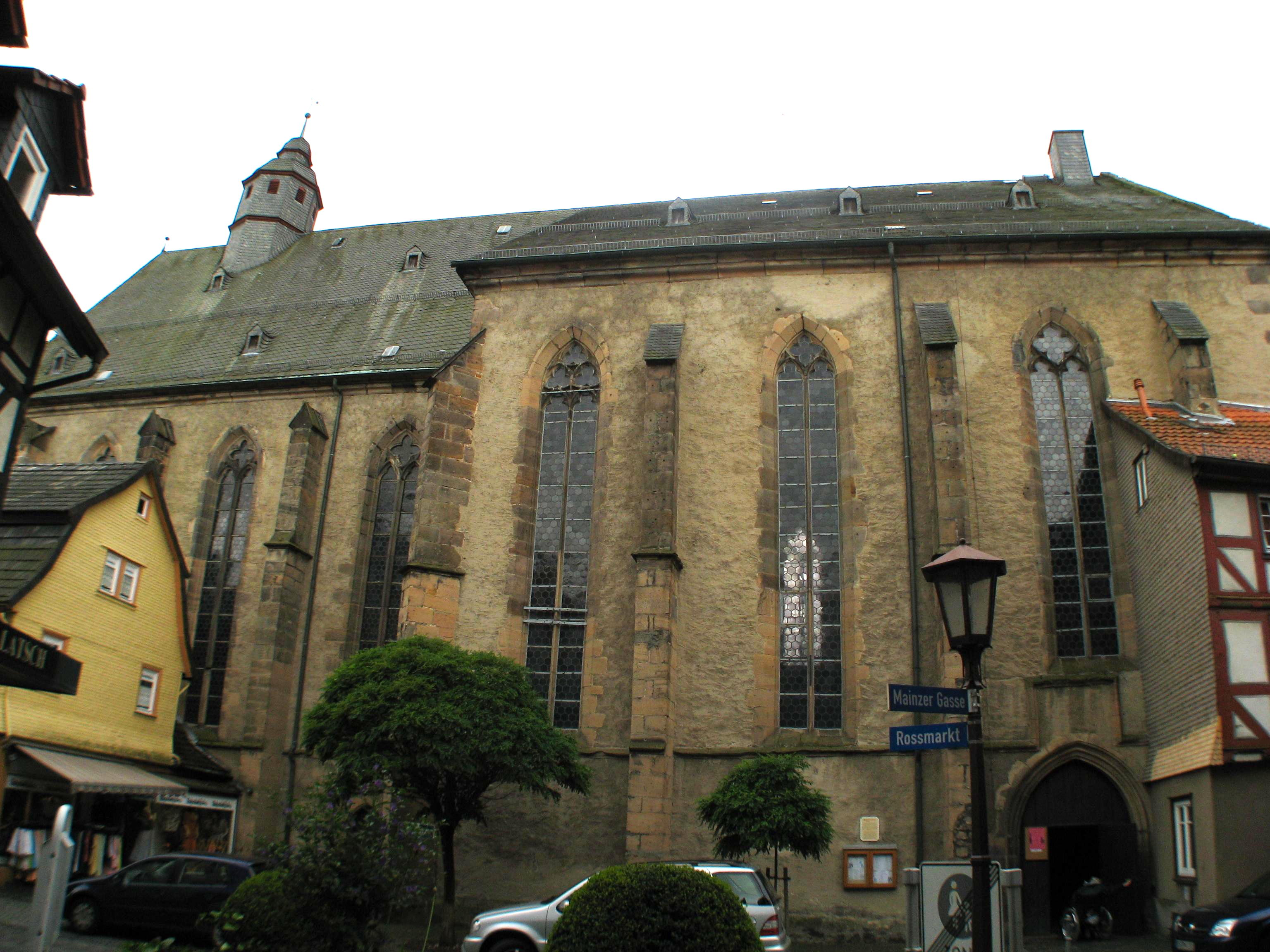 Dreifaltigkeitskirche Alsfeld, erbaut um das Jahr 1435